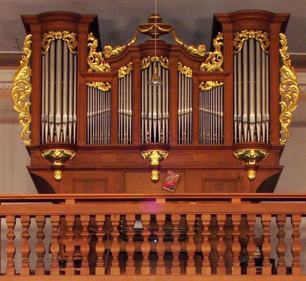 St. Martin (Freiburg) - Orgel, Ausschnitt aus file:St._Martin_(Freiburg)_04.jpg